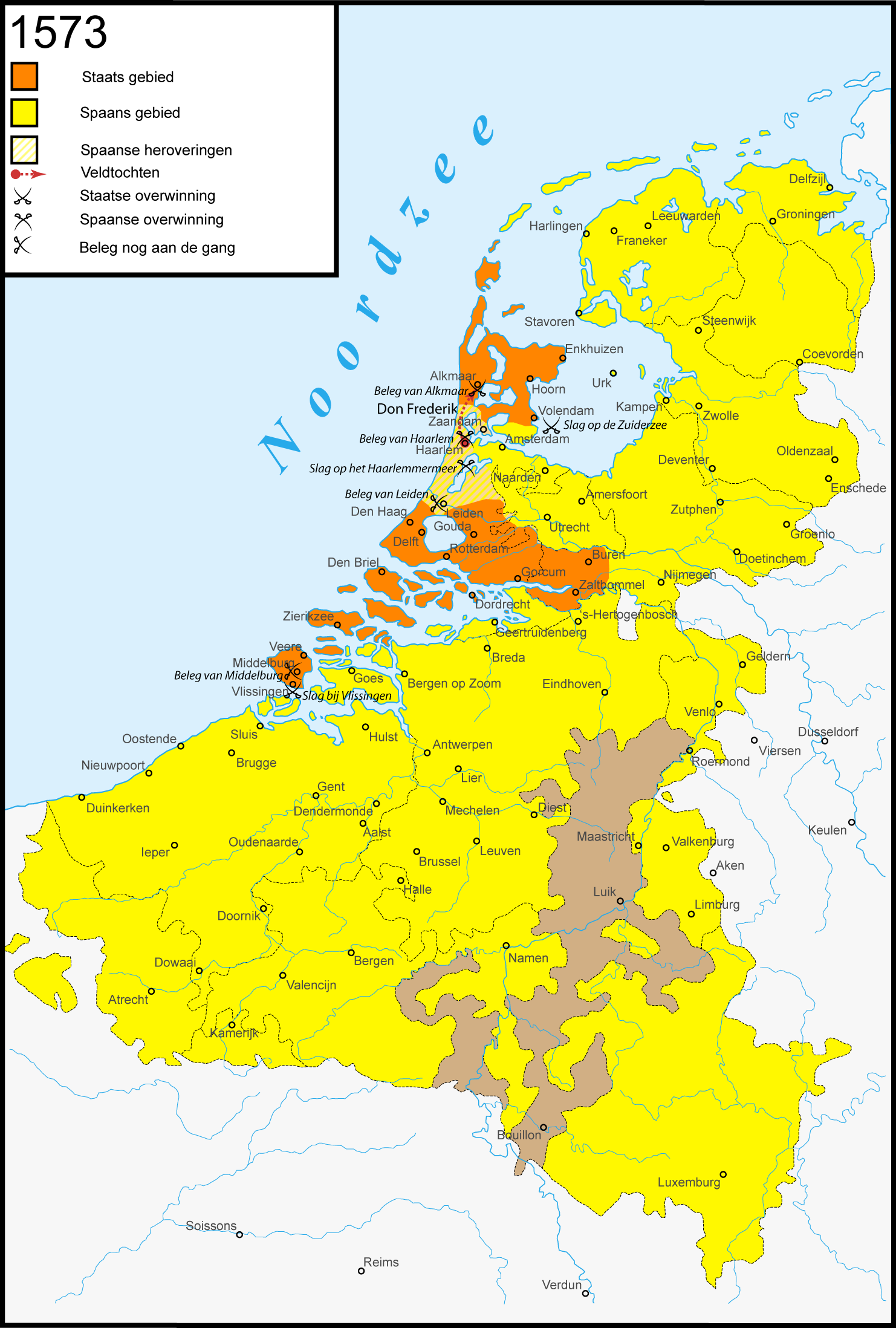 Krijgsbewegingen in de Tachtigjarige Oorlog: 1573. Nederlandse versie Engels: Warprogression in het Eighty Years' War: 1573. Dutch version